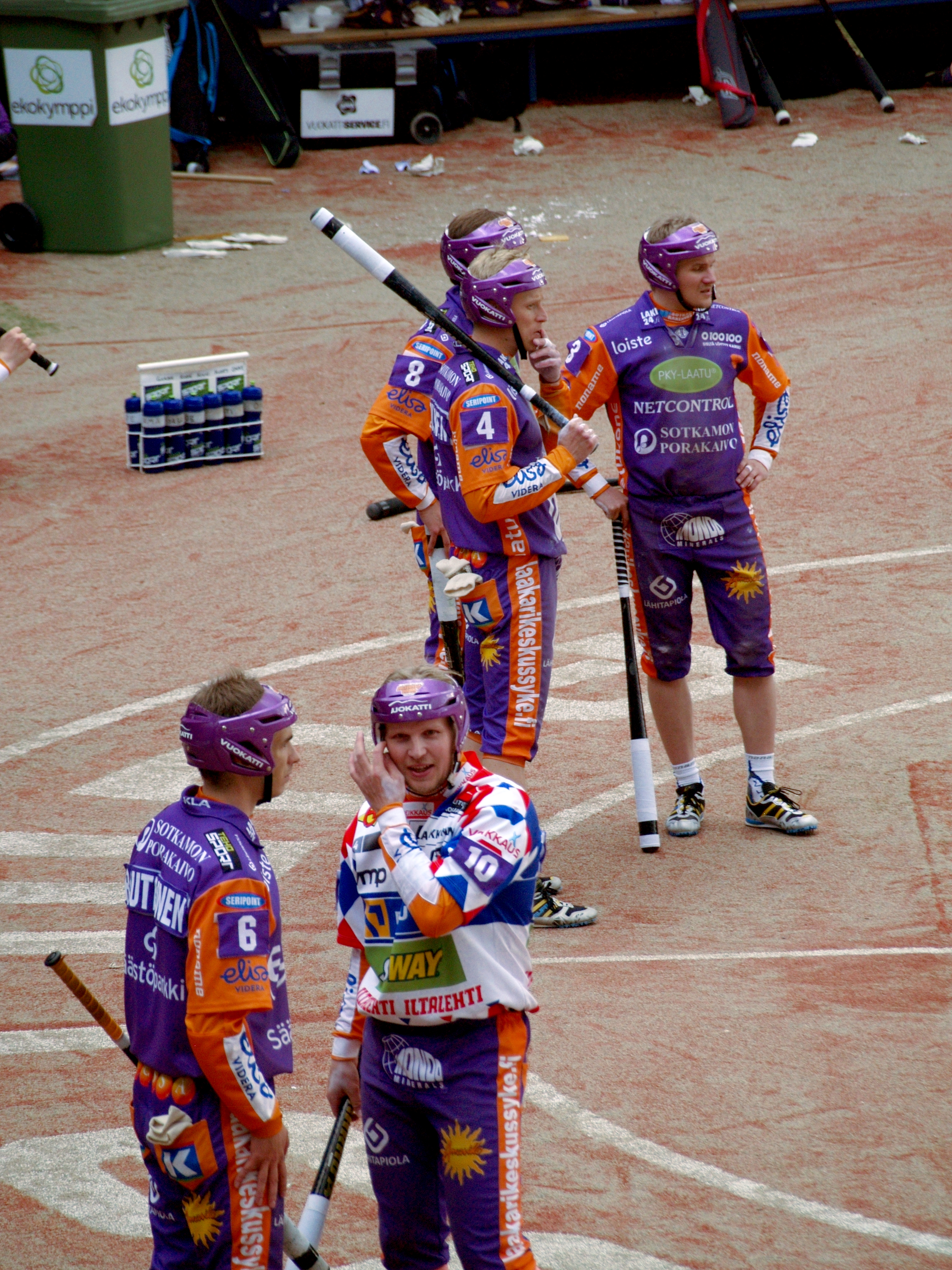 Vimpelin Veto - Sotkamon Jymy pesäpallo-ottelu 19.7.2015.